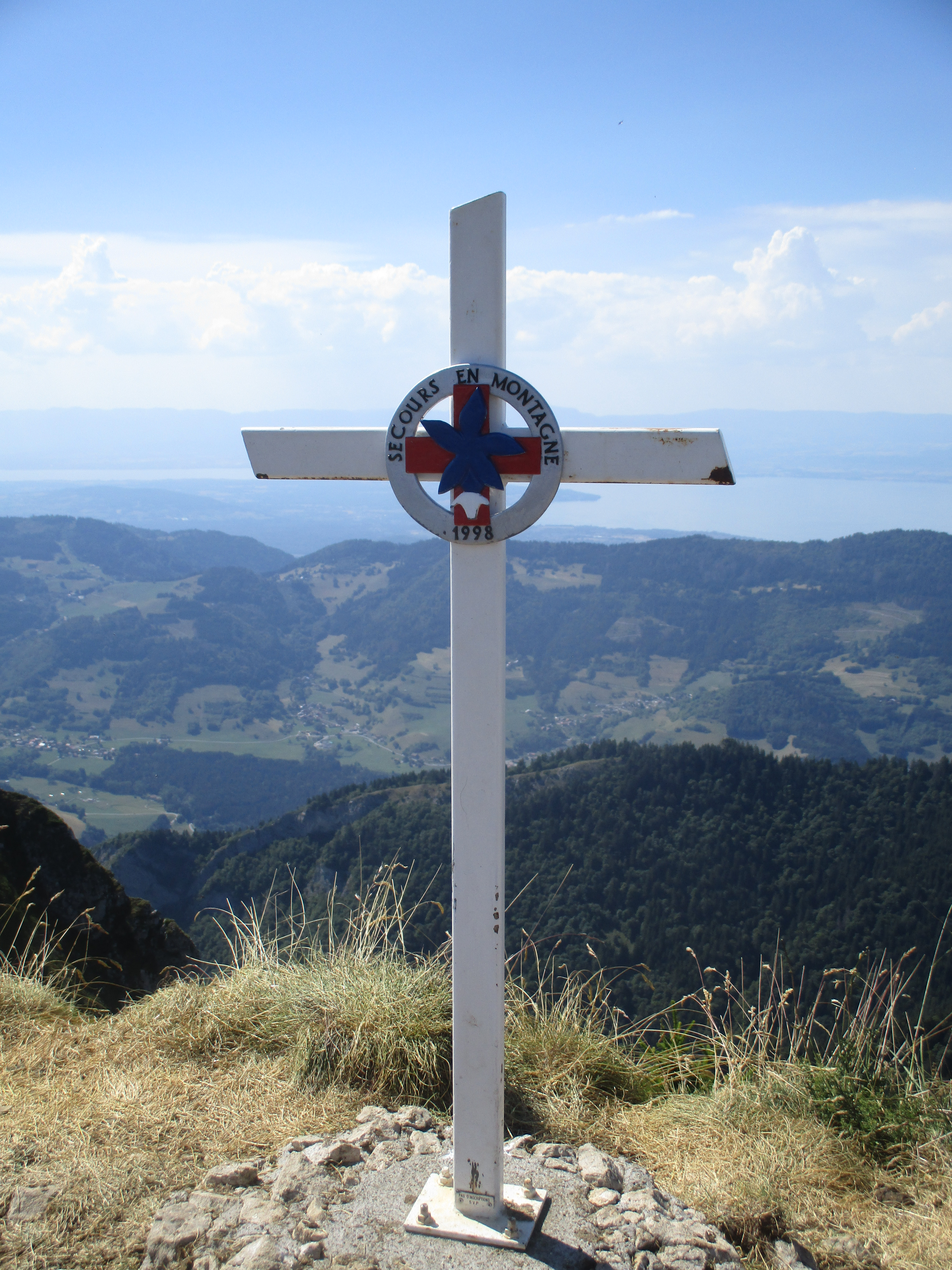 La croix est conçue en 1998 par le secours en montagne.